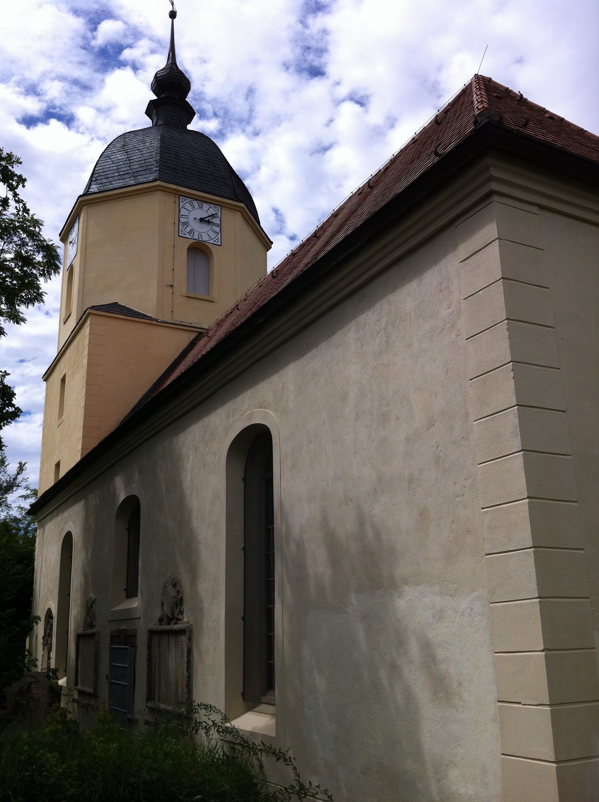 Kirche St. Katharinen in Halle (Saale), Stadtteil Ammendorf, von Südosten aus gesehen